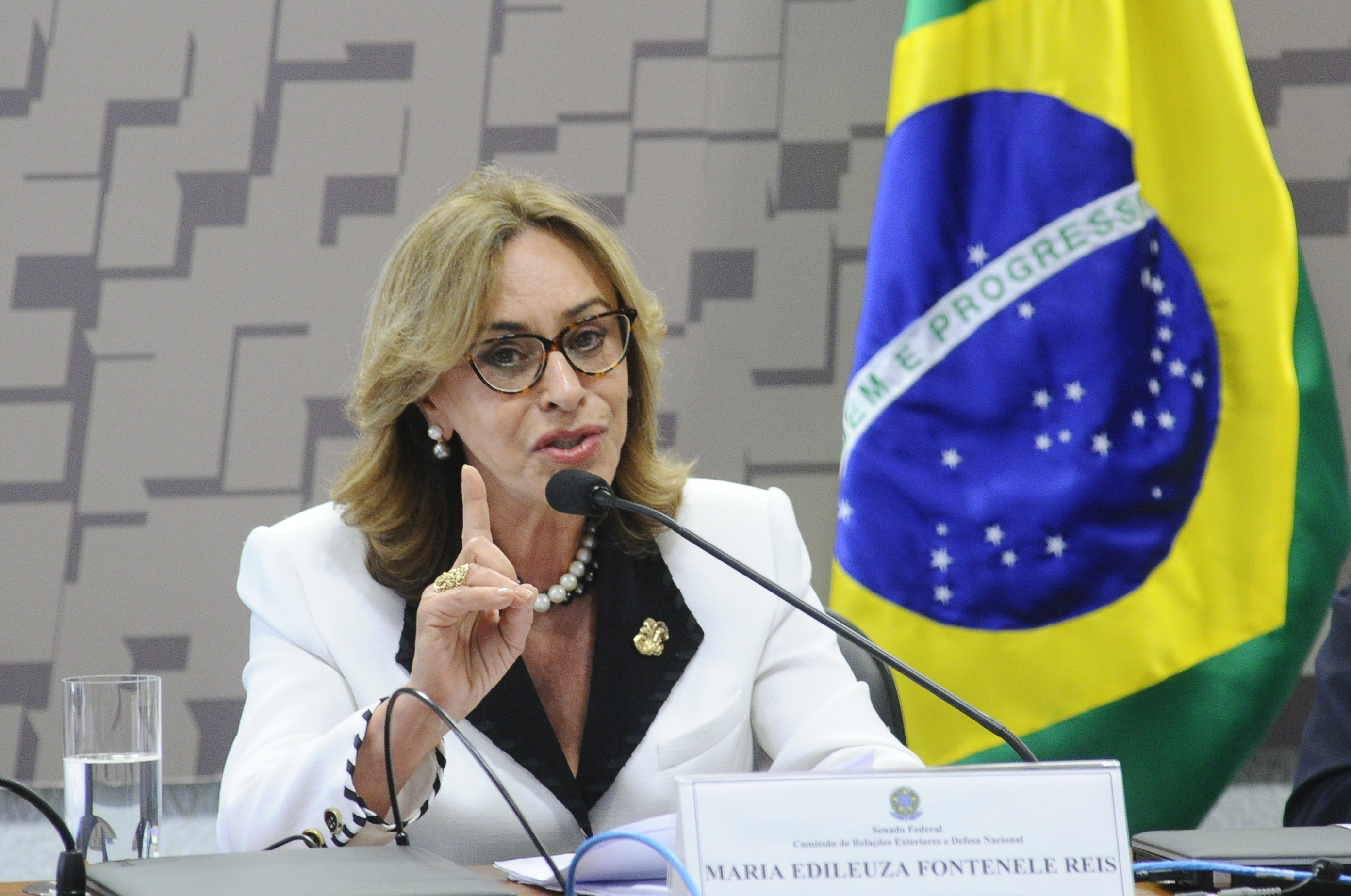 Comissão de Relações Exteriores e Defesa Nacional (CRE) realiza sabatina de diplomatas indicados para representar o Brasil na Unesco e em Belize. Em pronunciamento, indicada para o cargo de delegada permanente do Brasil junto à Organização das Nações Unidas para a Educação, a Ciência e a Cultura (UNESCO), Maria Edileuza Fontenele Reis. Foto: Geraldo Magela/Agência Senado